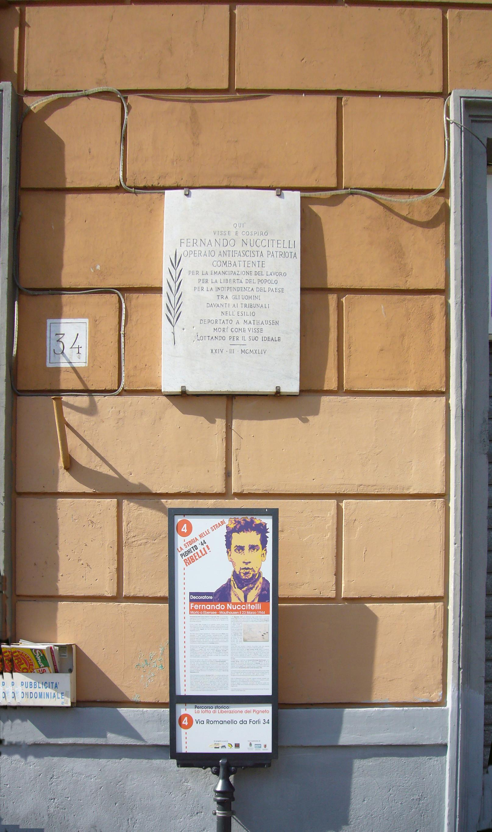 Roma, Pigneto: una tappa del Percorso della memoria del quartiere, intitolata a fernando Nuccitelli.